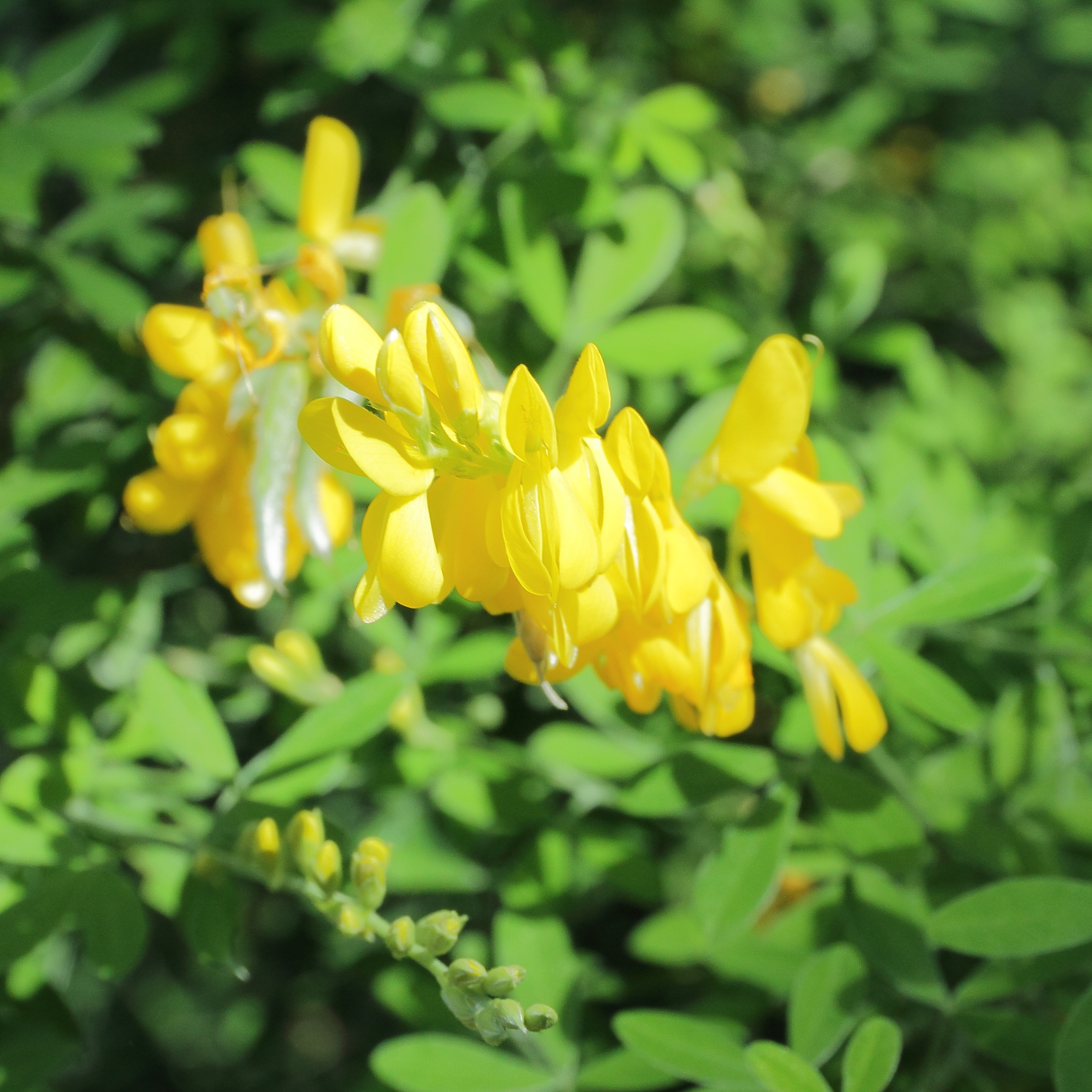 Genista canariensis i Bergianska trädgården.